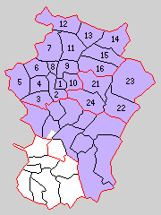 三重県阿拝郡・山田郡（後の阿山郡）の町村制時点の町村。